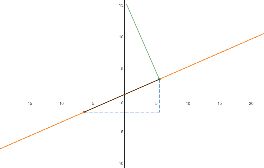 Ret linje med tilhørende normal- og retningsvektor